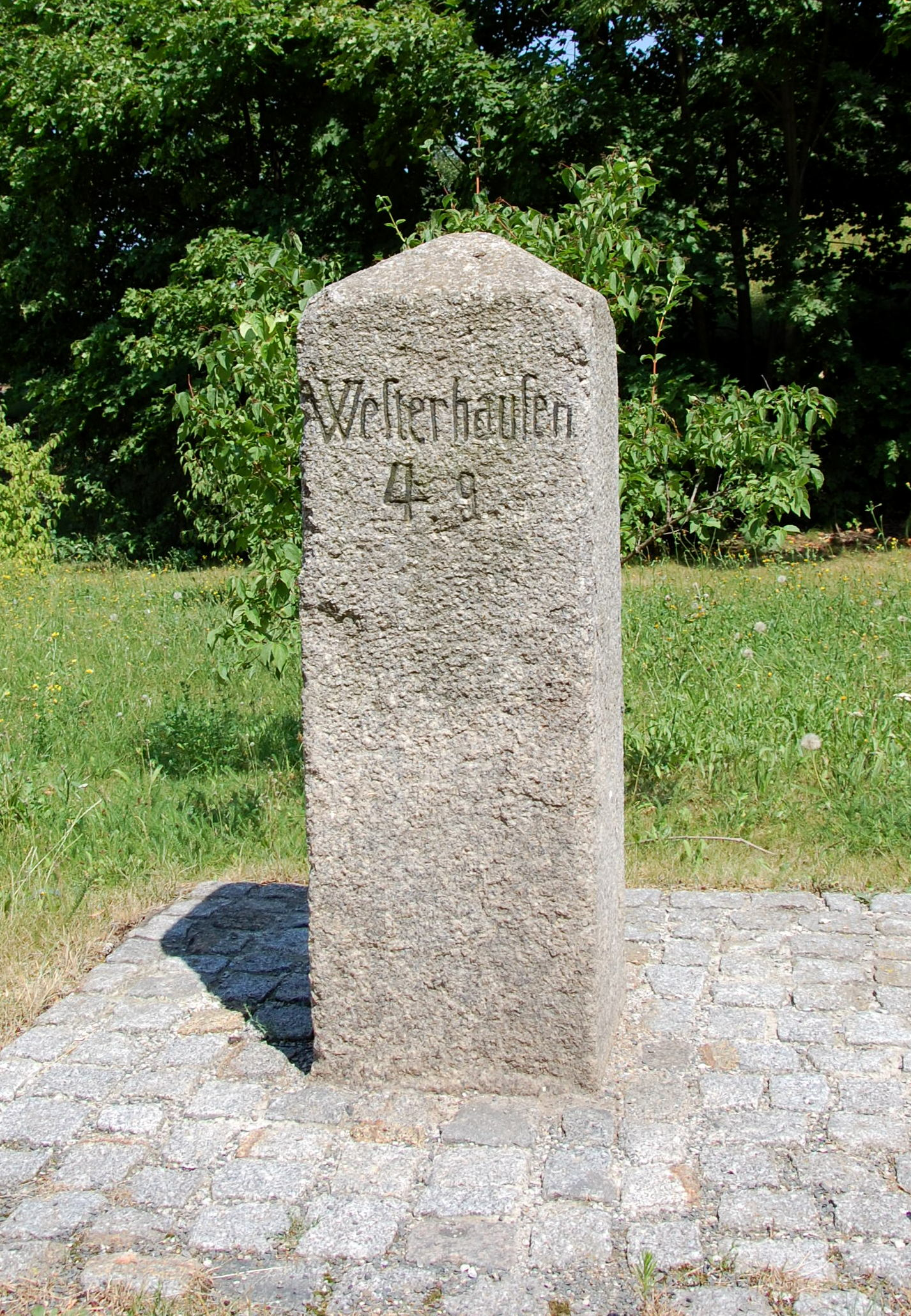 Westerhäuser Straße Wegweise (Quedlinburg)